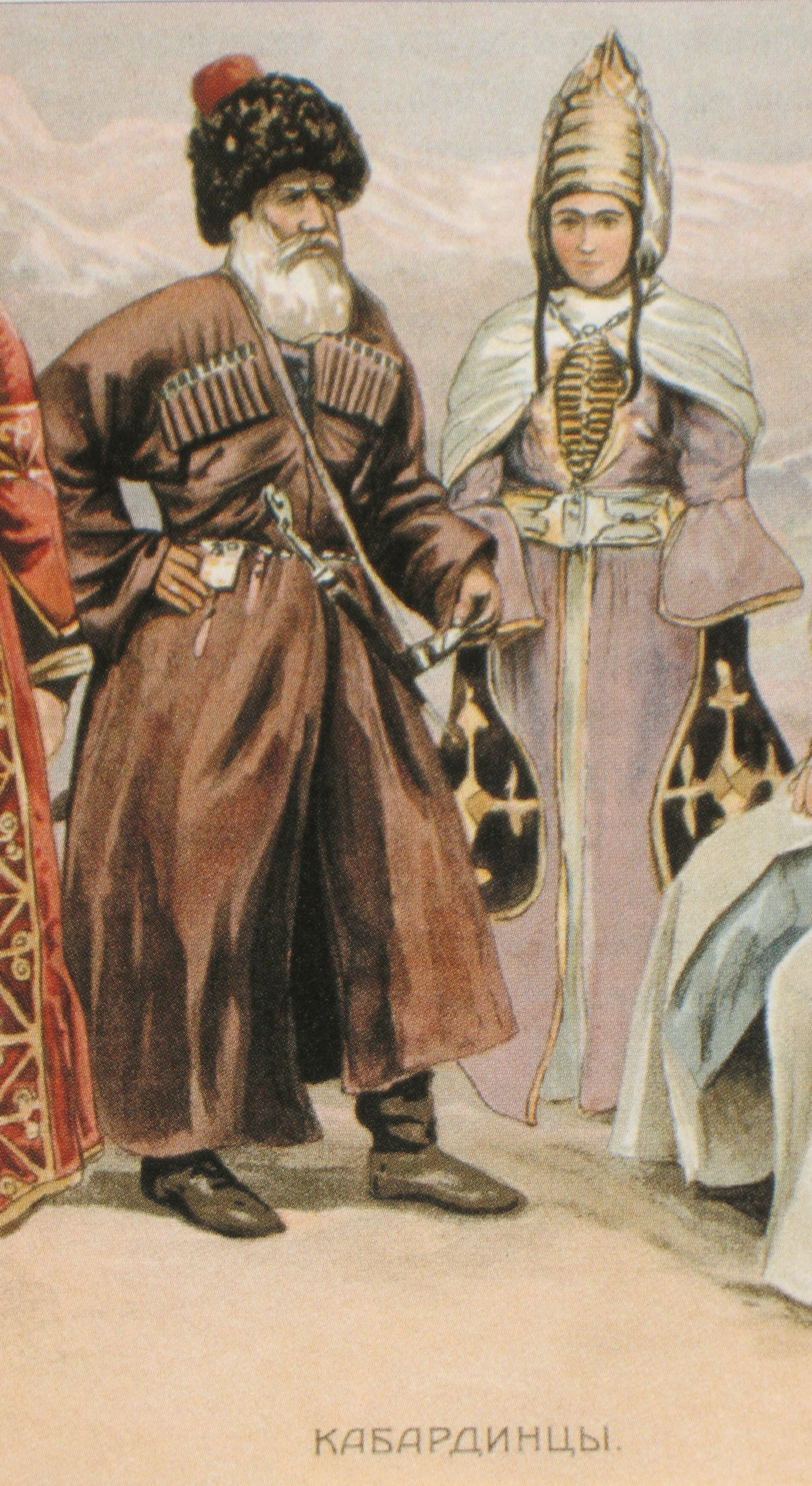 Народы Кавказа. Кабардинцы. Русская литография. Конец 19 века.